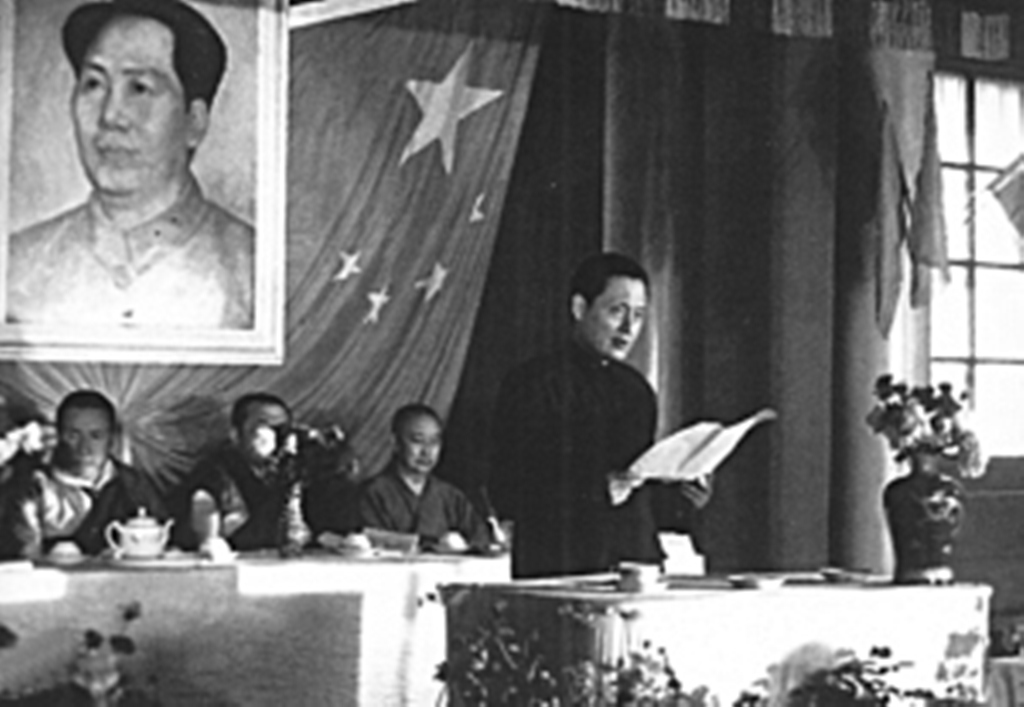 1953年，中国佛教协会筹备处主任赵朴初居士报告中国佛教协会成立、发起经过及筹备工作。